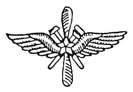 Эмблема авиационных техников Красной Армии